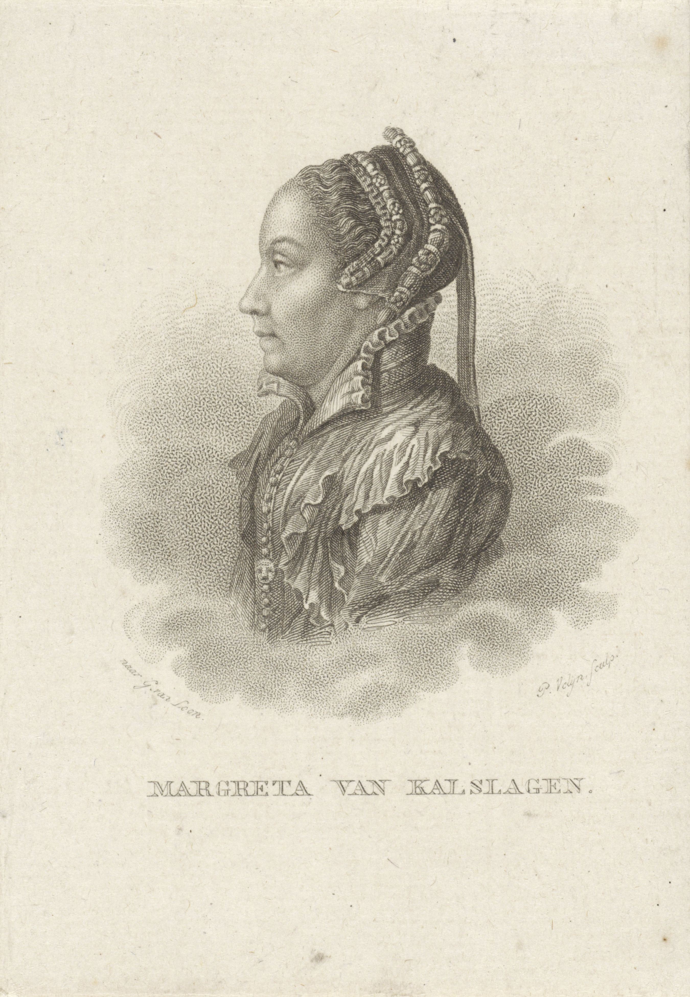 IdentificatieTitel(s): Portret van Margaretha CoppierObjecttype: prent Objectnummer: RP-P-1906-1573Catalogusreferentie: Van Someren 2856Collectie Rijksmuseum-2(2)Opmerking: 2 staten in de collectie van het RijksmuseumOpschriften / Merken: verzamelaarsmerk, verso, gestempeld: Lugt 2228Omschrijving: Portret van Margaretha Coppier, genoemd Margaretha van Kalslagen, zestiende eeuwse heldin van Antwerpen.VervaardigingVervaardiger: prentmaker: Philippus Velijn (vermeld op object)naar ontwerp van: G. van Loon (vermeld op object)Plaats vervaardiging: NederlandDatering: 1797 - 1836Fysieke kenmerken: ets en gravureMateriaal: papier Techniek: etsen / graveren (drukprocedé)Afmetingen: blad: h 112 mm × b 79 mmOnderwerpWie: Margaretha CoppierVerwerving en rechtenVerwerving: aankoop 1906Copyright: Publiek domein